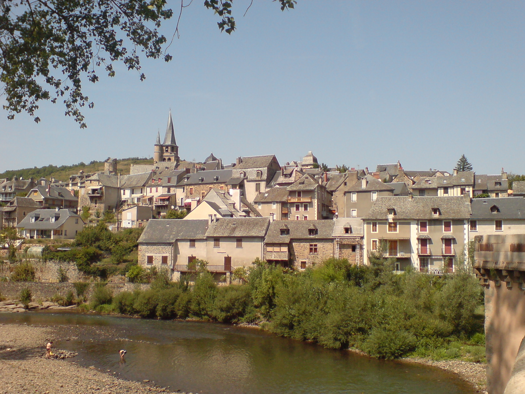 Vue sur Saint-Côme-d'Olt depuis l'extrémité du pont.